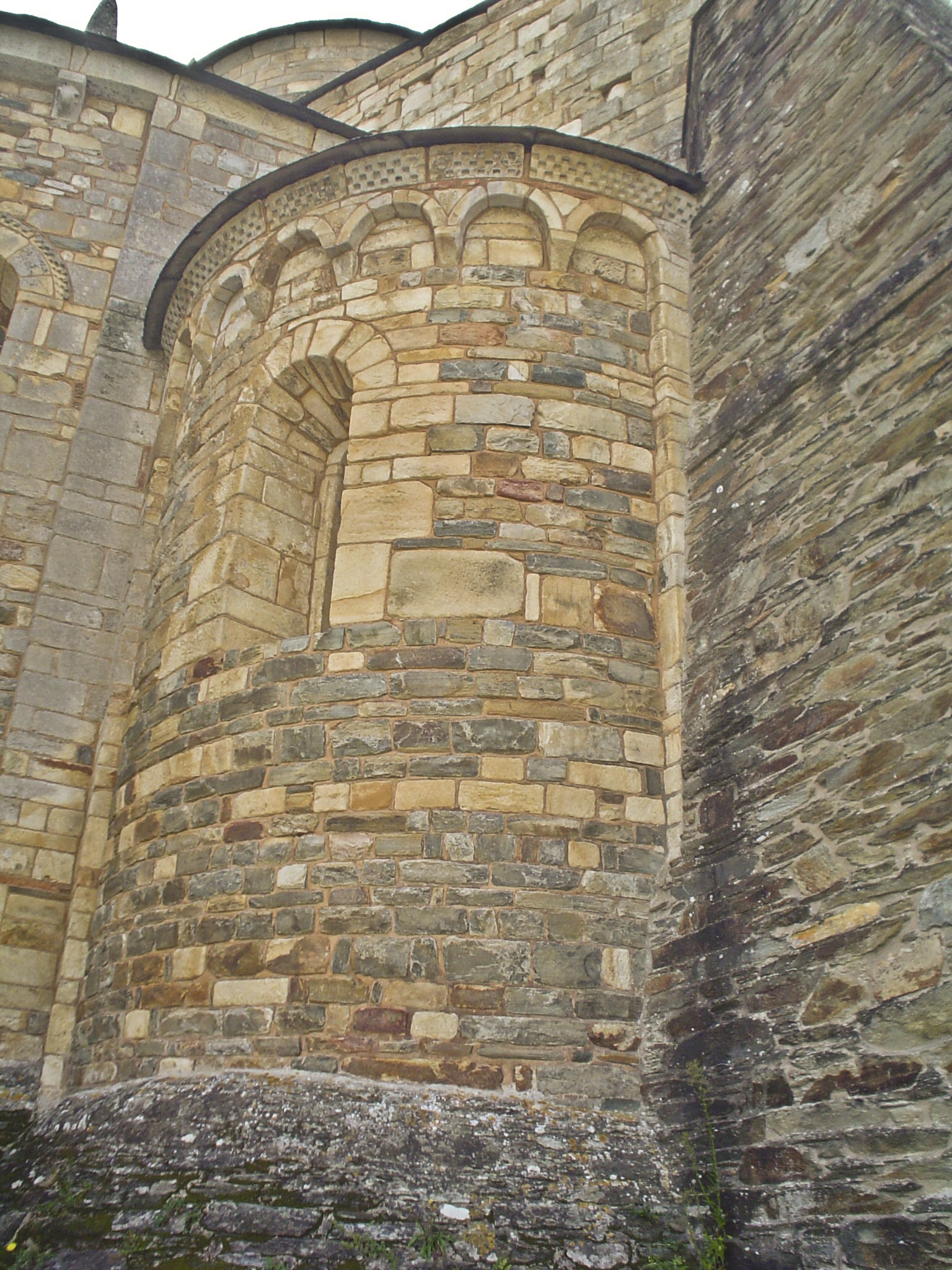 Exterior ábsida románica da Igrexa de San Martiño de Mondoñedo